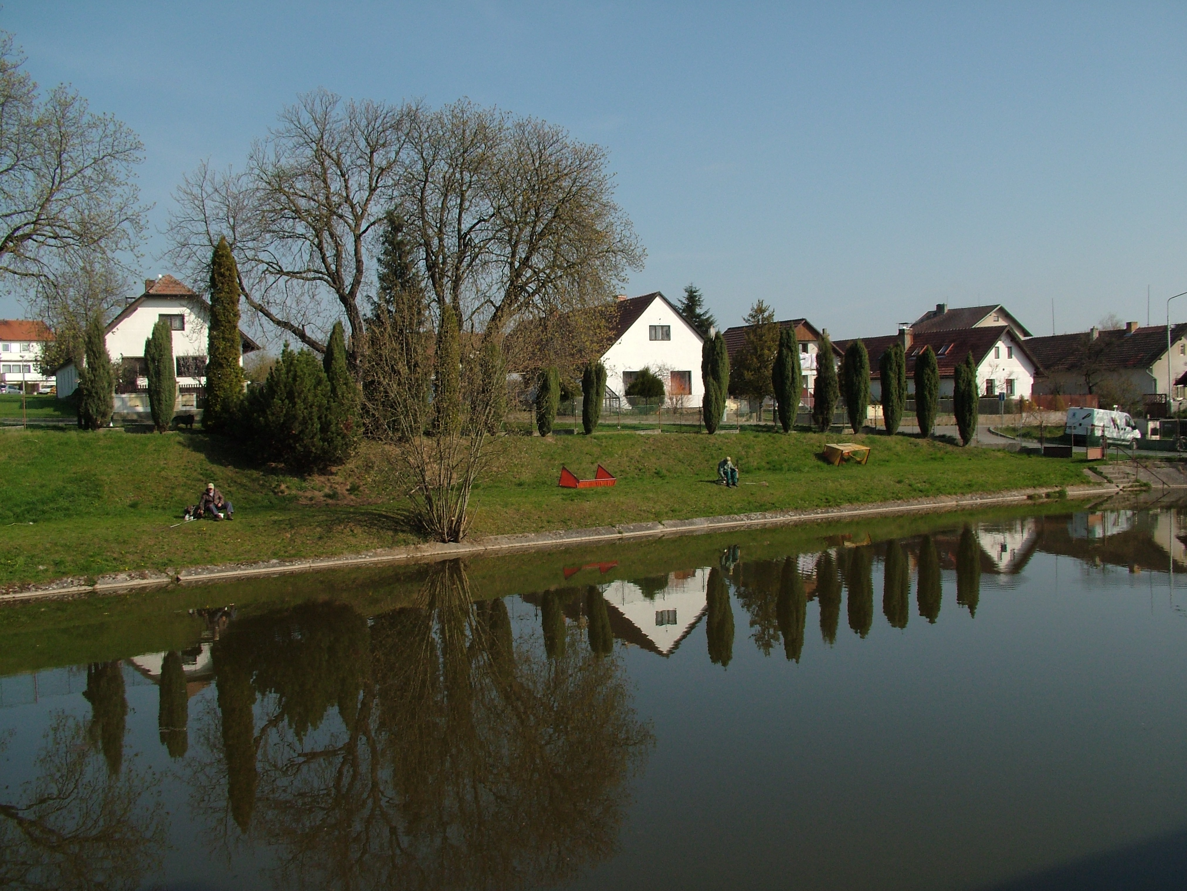 Autor fotografií: Vít Švajcr; Vít Švajcr´s photographs